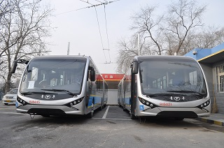 中文（中国大陆）: 即将上路的新车